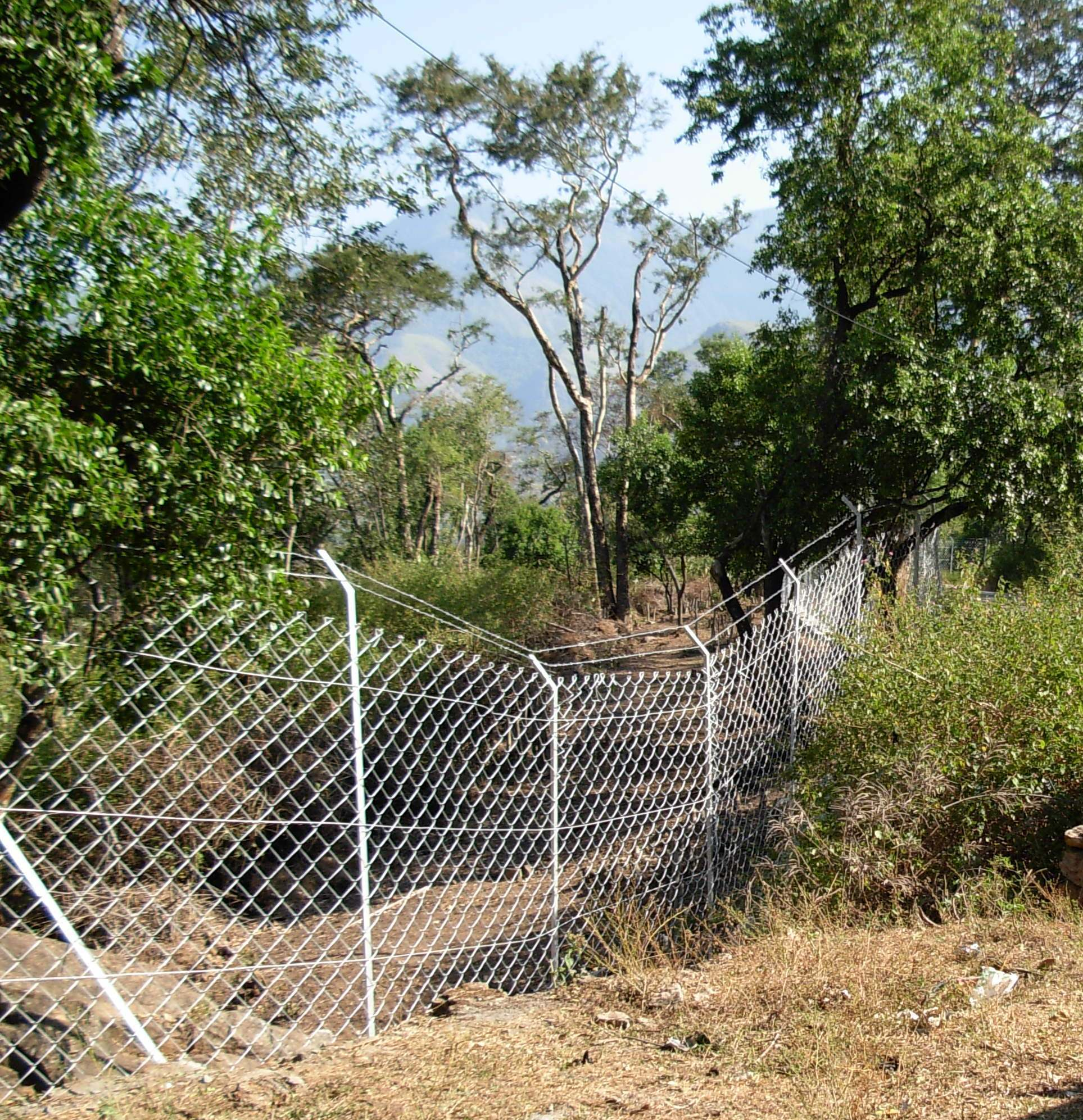 മറയൂരിൽ ചന്ദനത്തോട്ടം സർക്കാർ വേലികെട്ടി സംരക്ഷിച്ചിരിക്കുന്നു.